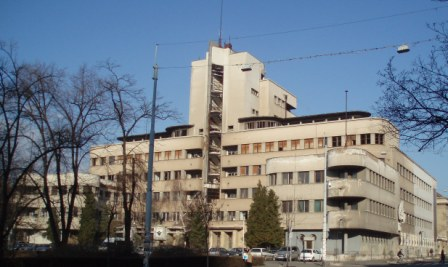 Фотографија зграде: Драгиша Брашован: Зграда Команде ваздухопловства у Земуну, Аутор: Nicolo